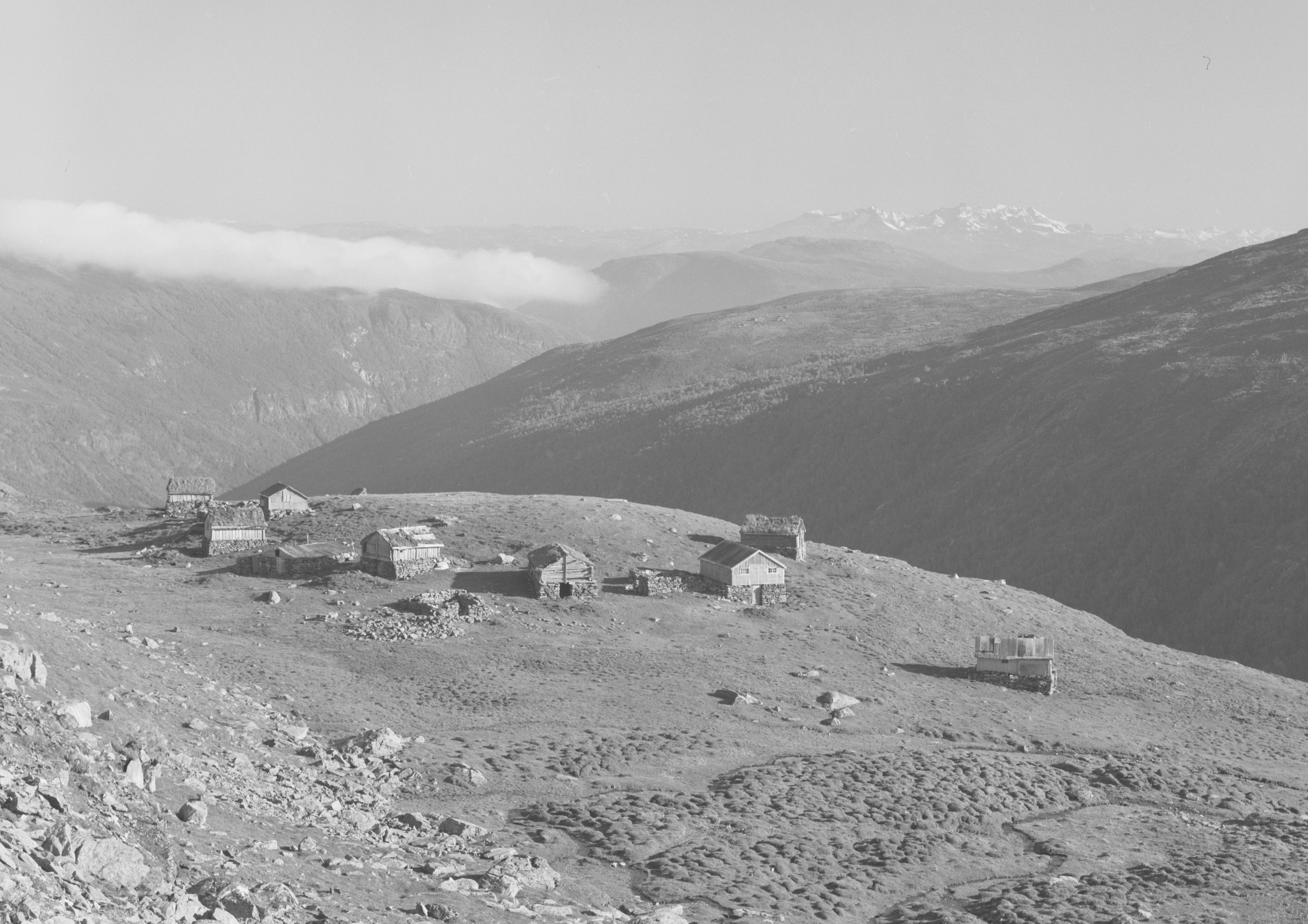 Bildet er hentet fra Nasjonalbibliotekets bildesamling Horndalen, Lærdal, Sogn og Fjordane